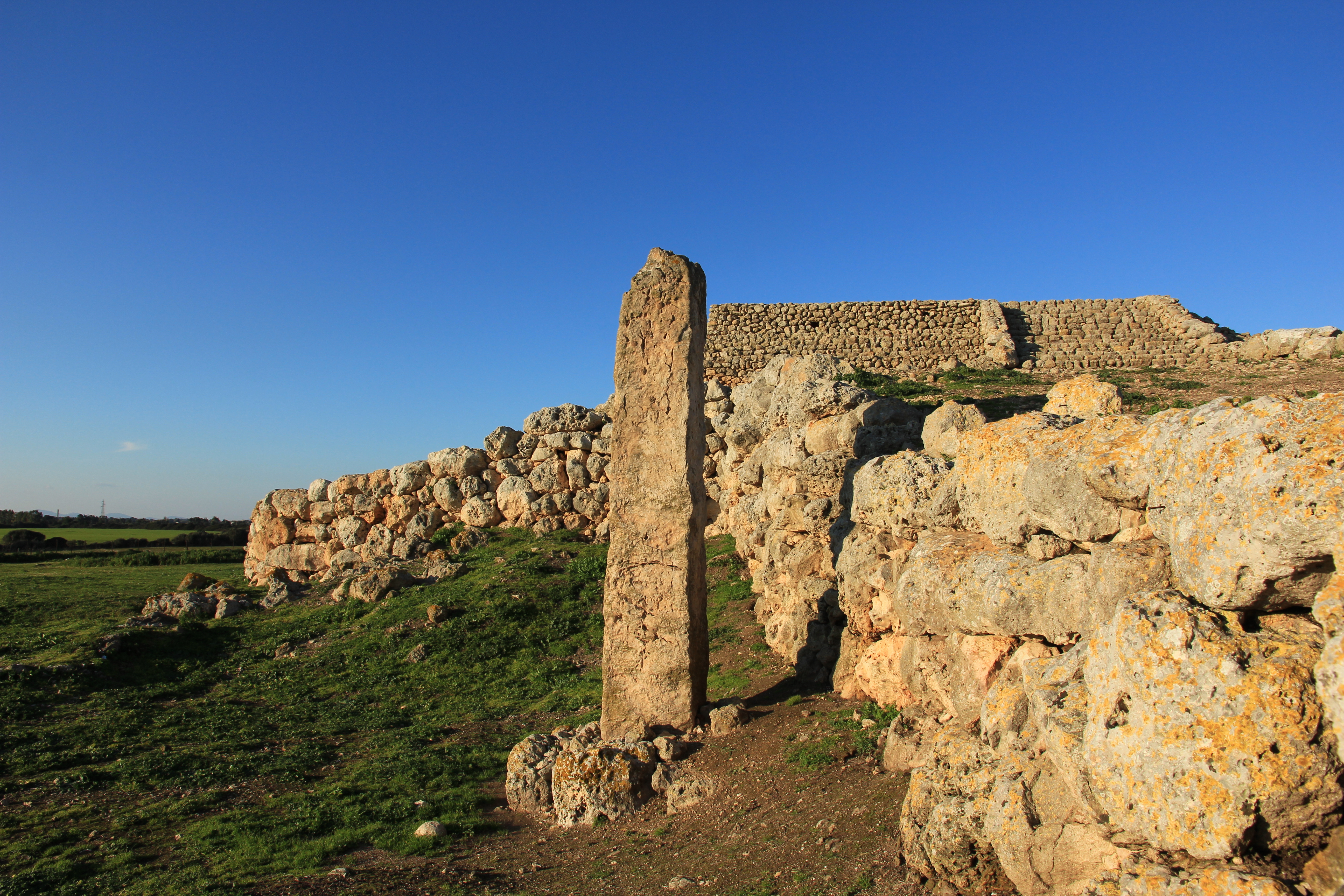 Sassari - Complesso prenuragico di Monte d'Accoddi